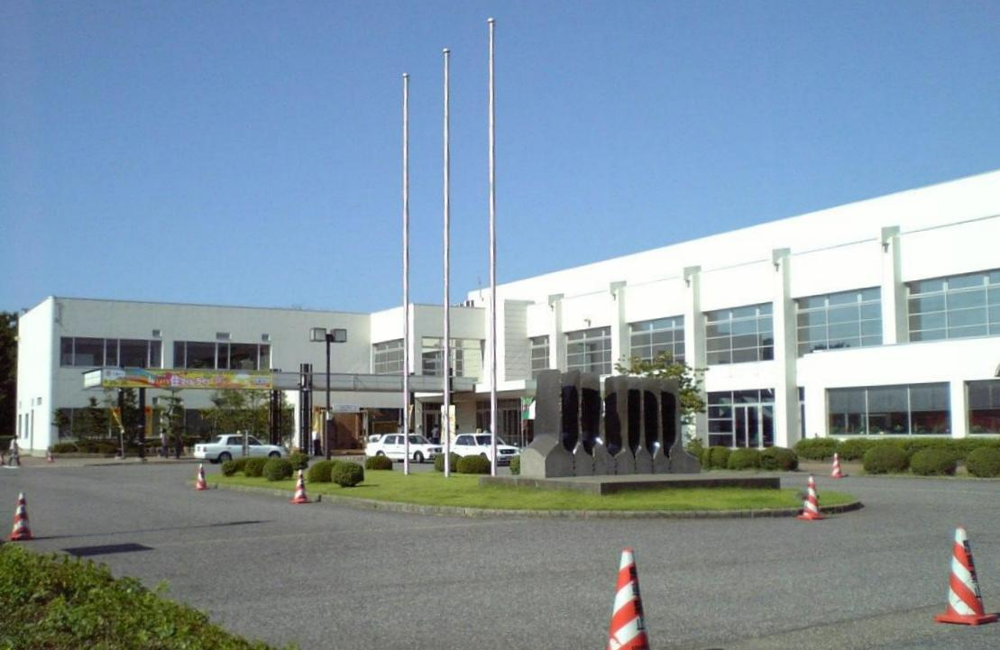 新潟市産業振興センター。